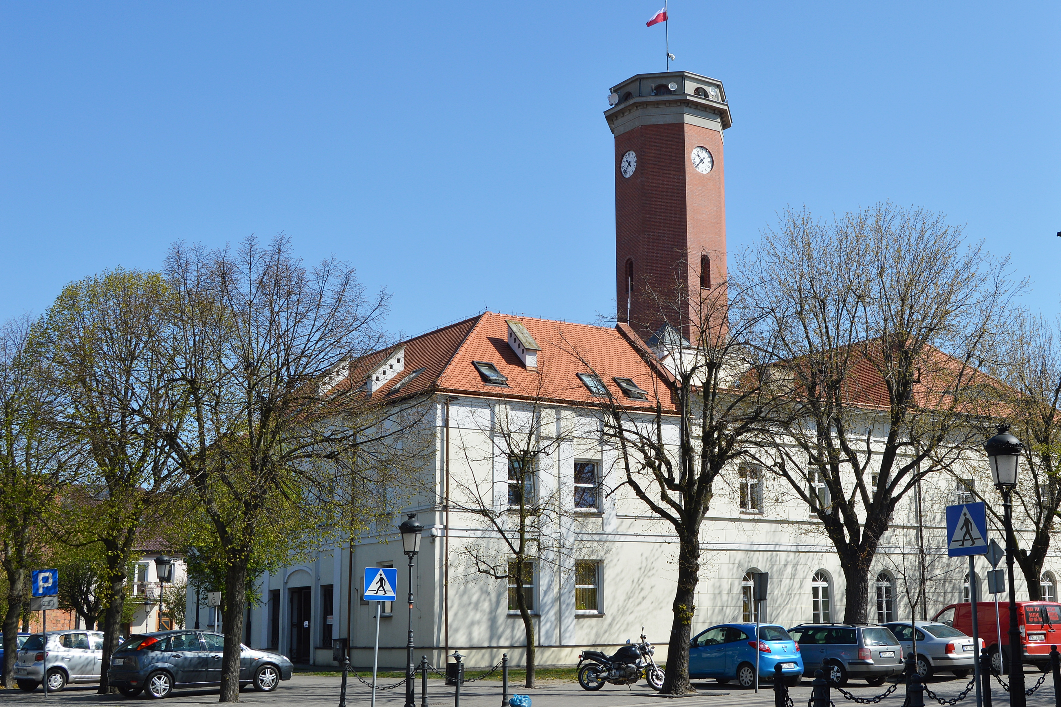 Ratusz miejski w Kole - widok od południowego-zachodu, z narożnika ulic Grodzkiej i Rzeźniczej